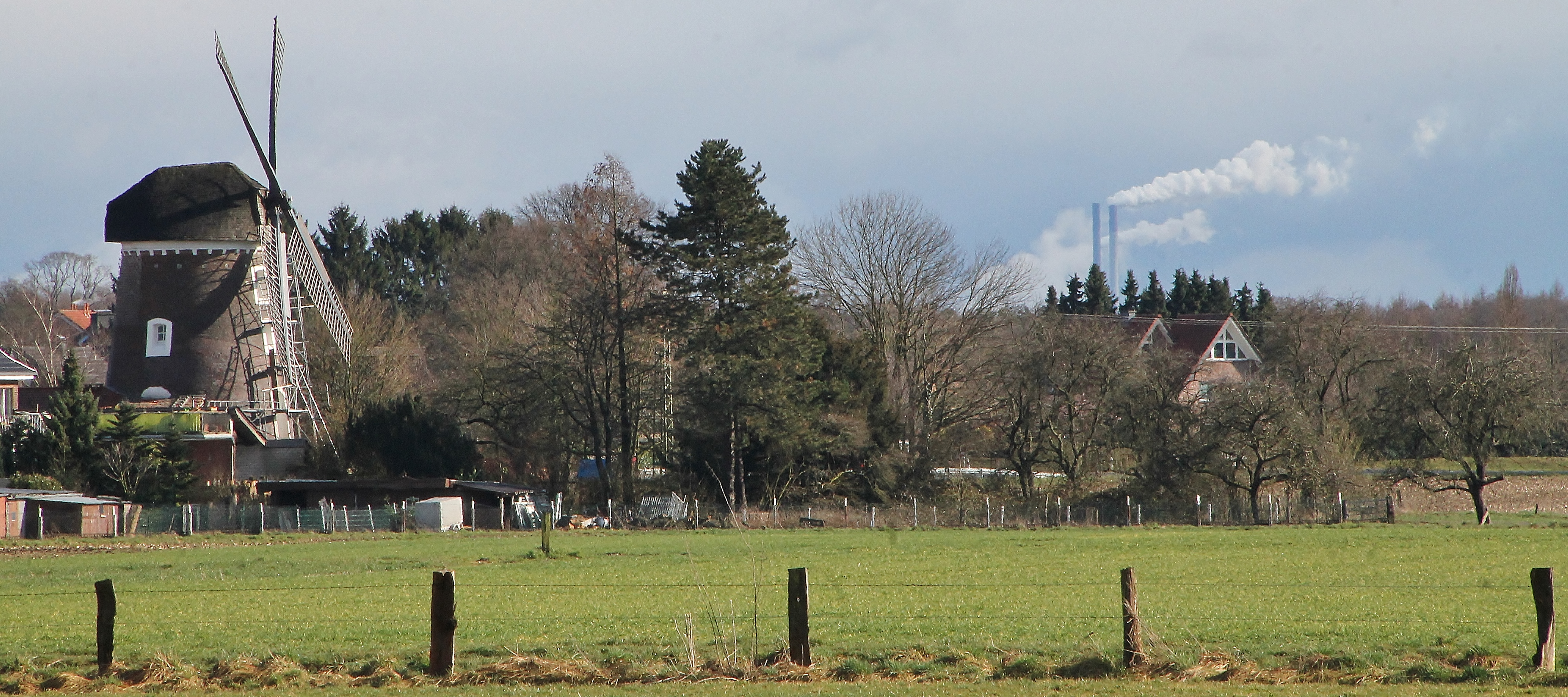 Alter Erler Mühle